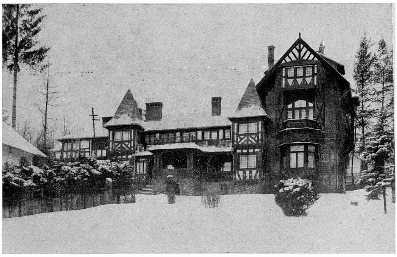 1900 - Vila de la Sinaia, România, a familiei Take Ionescu (Vila Negoiu) restaurator Henri Suskind (1868-1929), intrată în posesia familiei Ionescu - Take și soția Bessi Richards în 1893, restaturată 1895.